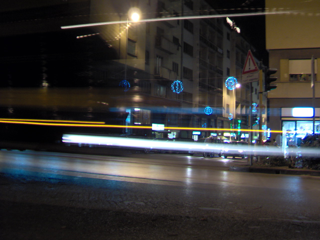 luci